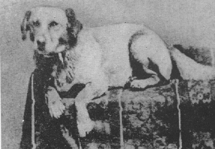 Фотография собаки Авраама Линкольна по кличке Фидо (Fido), Снимок сделан в 1861 году. Хранится в Библиотеке и Музее Авраама Линкольна.